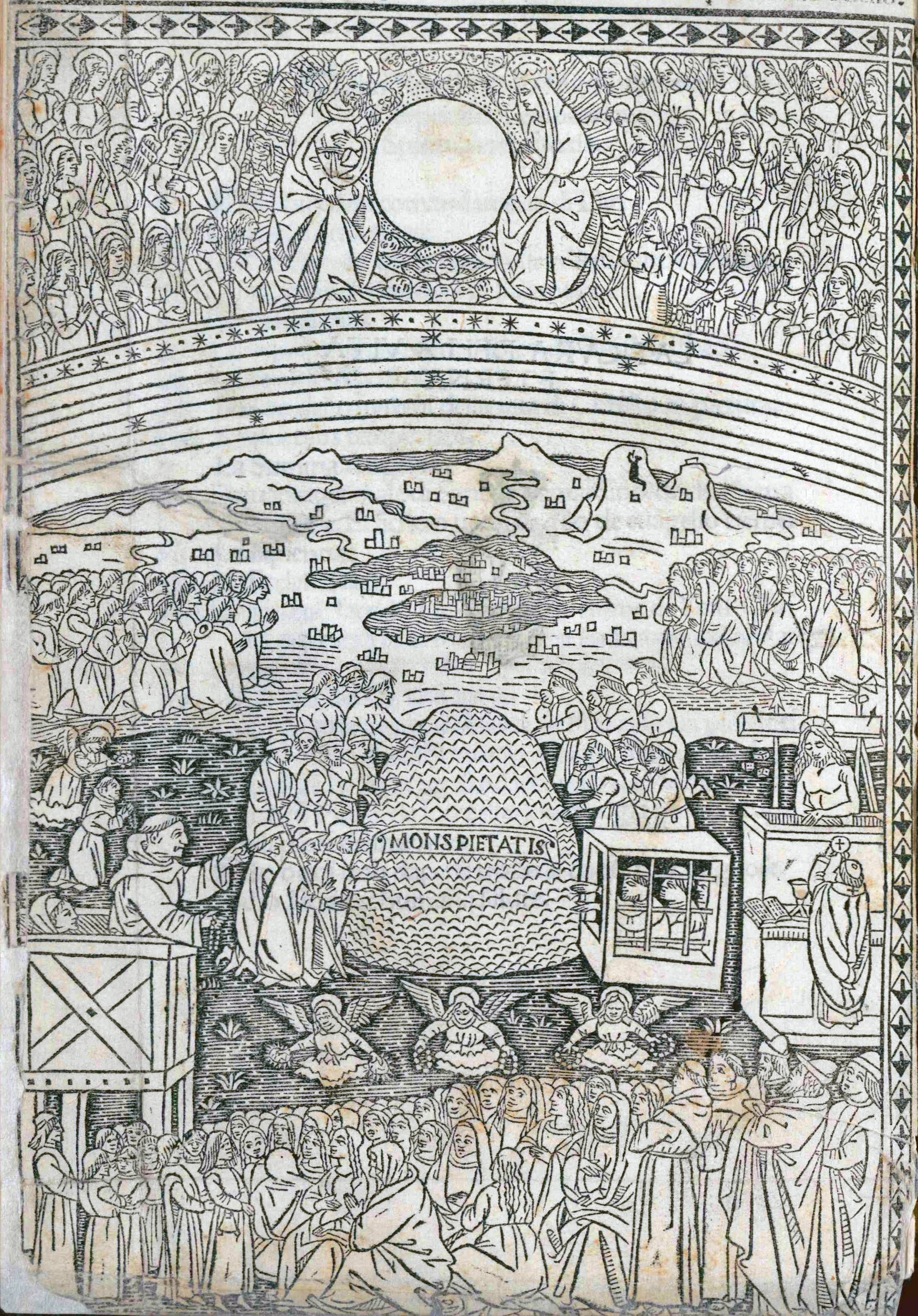 carta a2v